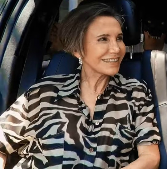 Florinda Meza en una entrevista del Escorpión Dorado (circa 3:38)